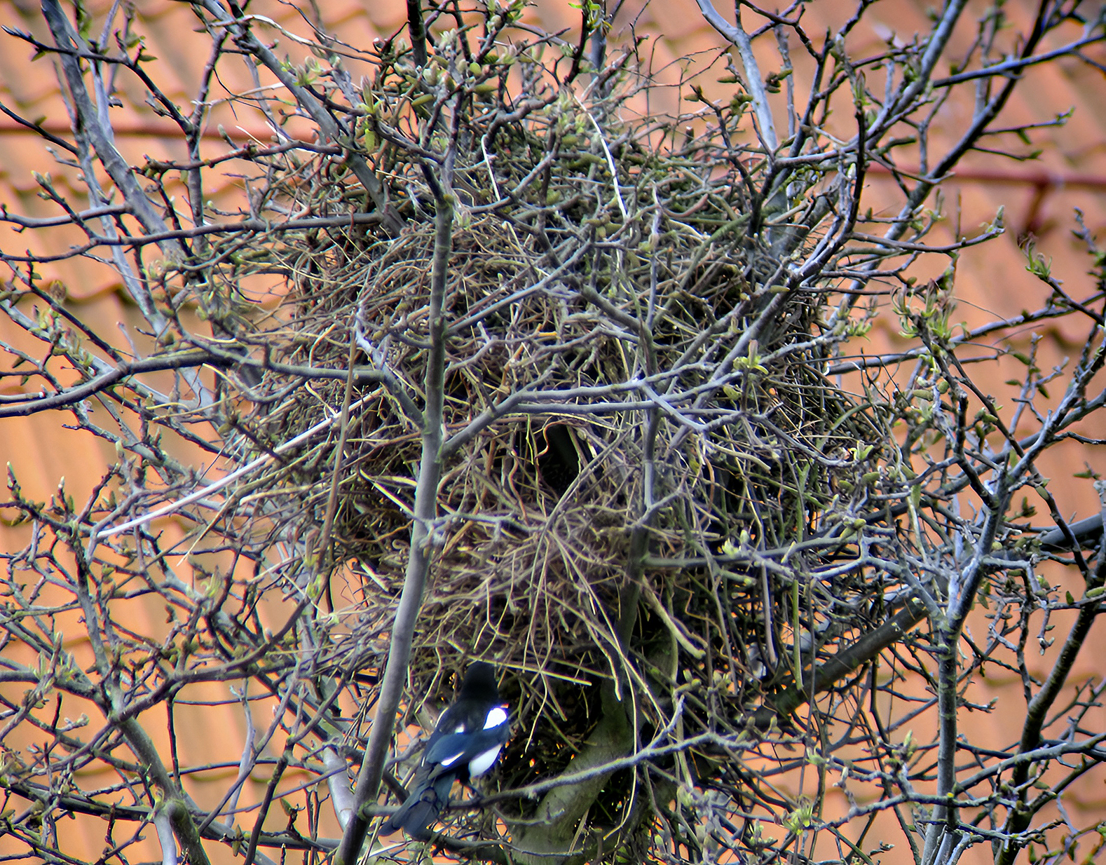 Skatbo med en vuxen Skata på väg in i boet. Ystad 2012.